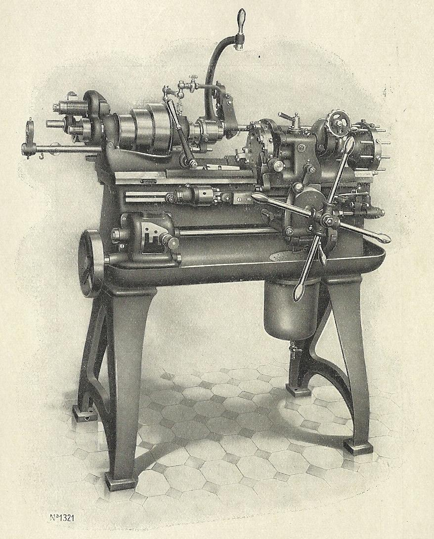 Pittler Revolver - Modell BRA